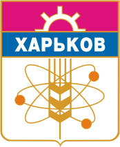 Исторический герб города Харькова. Советский. 1968.